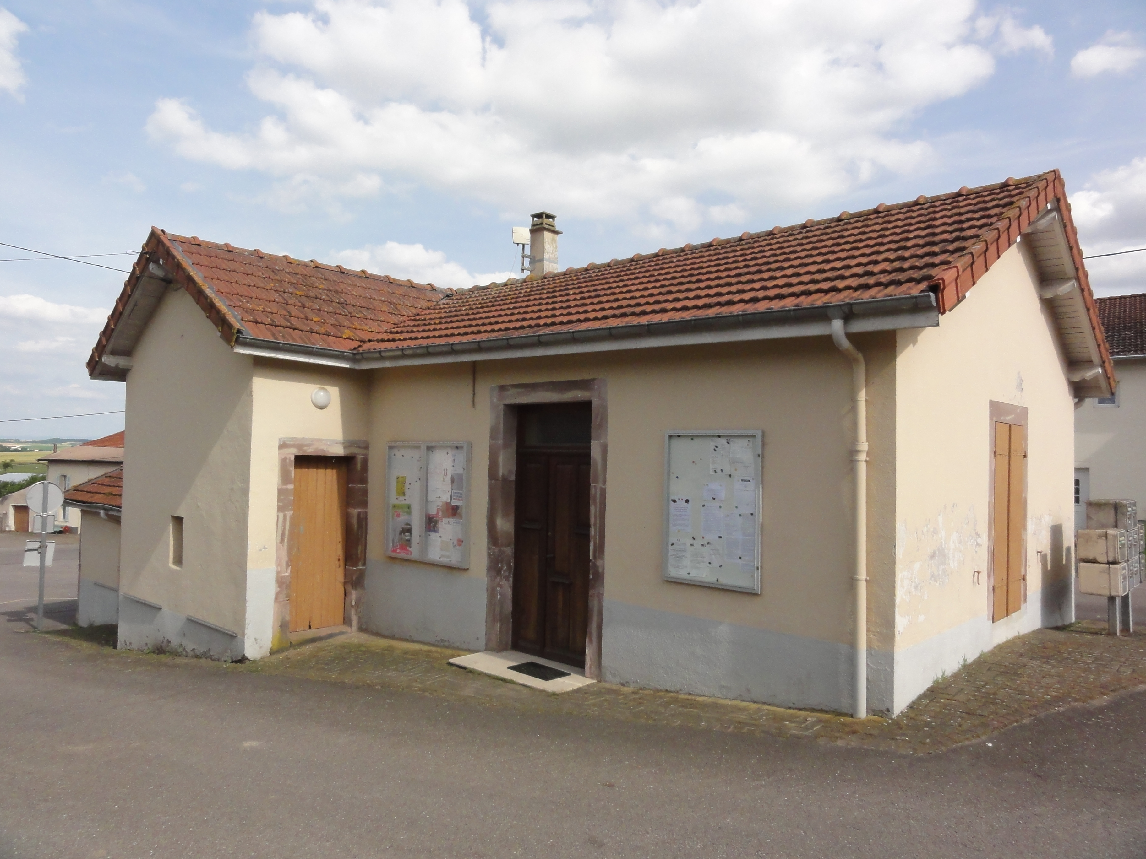 Borville (M-et-M) mairie